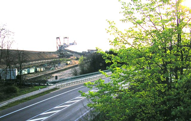 Tagebau Bergheim 2009 mit der Bundesstraße 477 bei Niederaußem im Vordergrund.